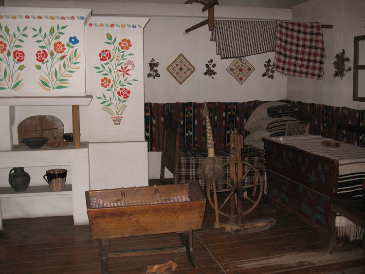 Интерьер подольской хаты, реконструкция в музее этнографии во Львове